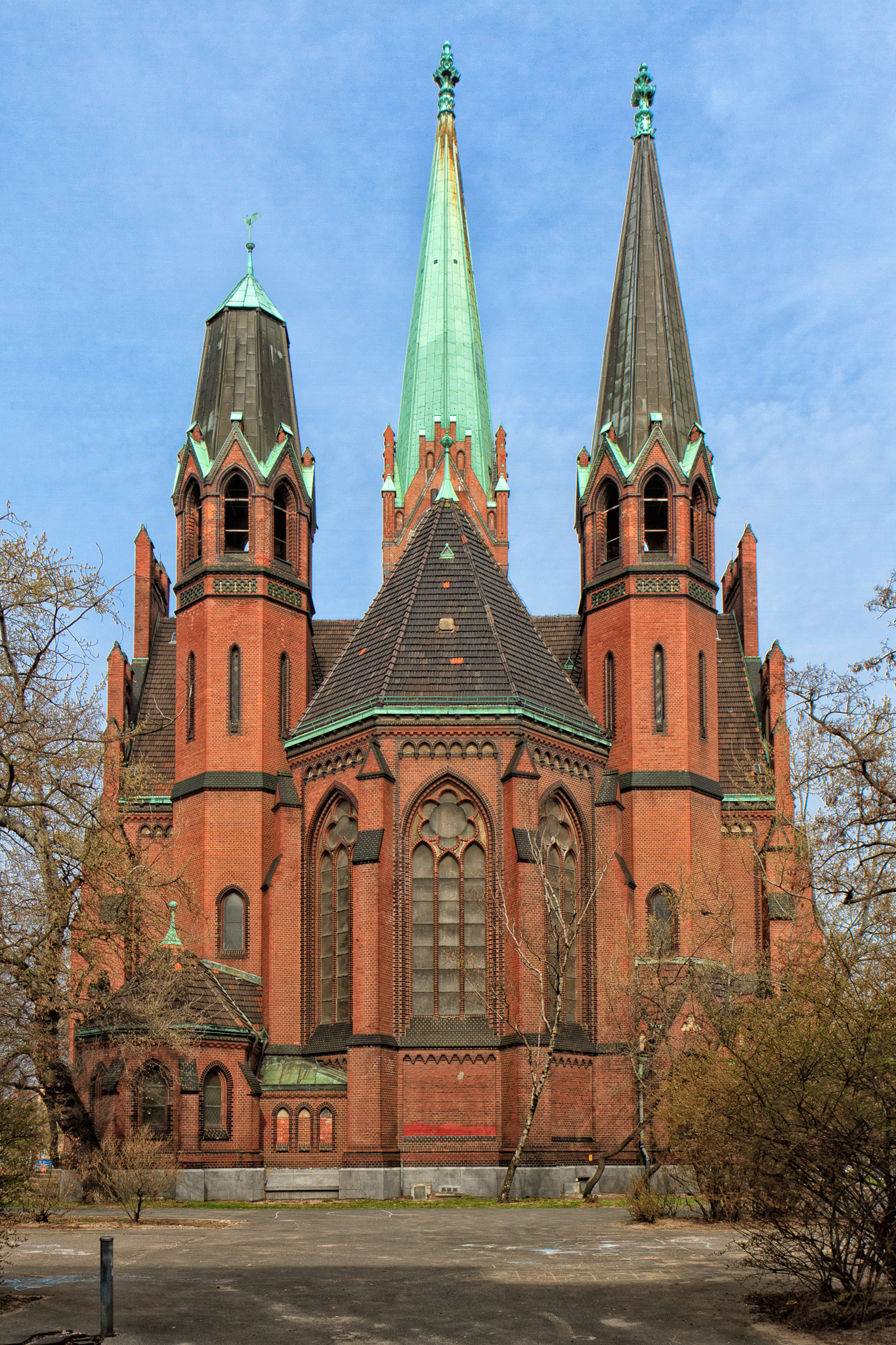 Die Apostel-Paulus-Kirche in Berlin-Schöneberg vom Süden aus gesehen.This is a photograph of an architectural monument.